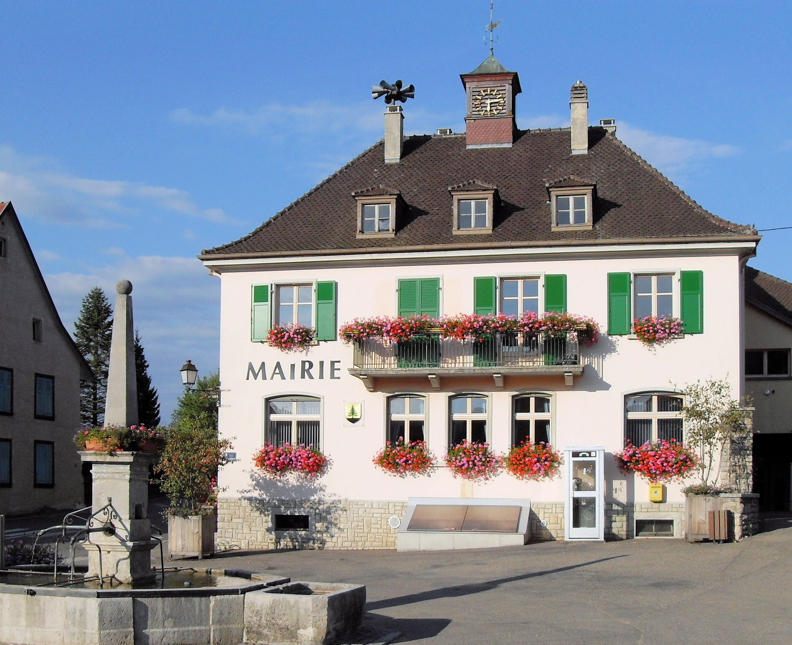 La mairie de Wolschwiller